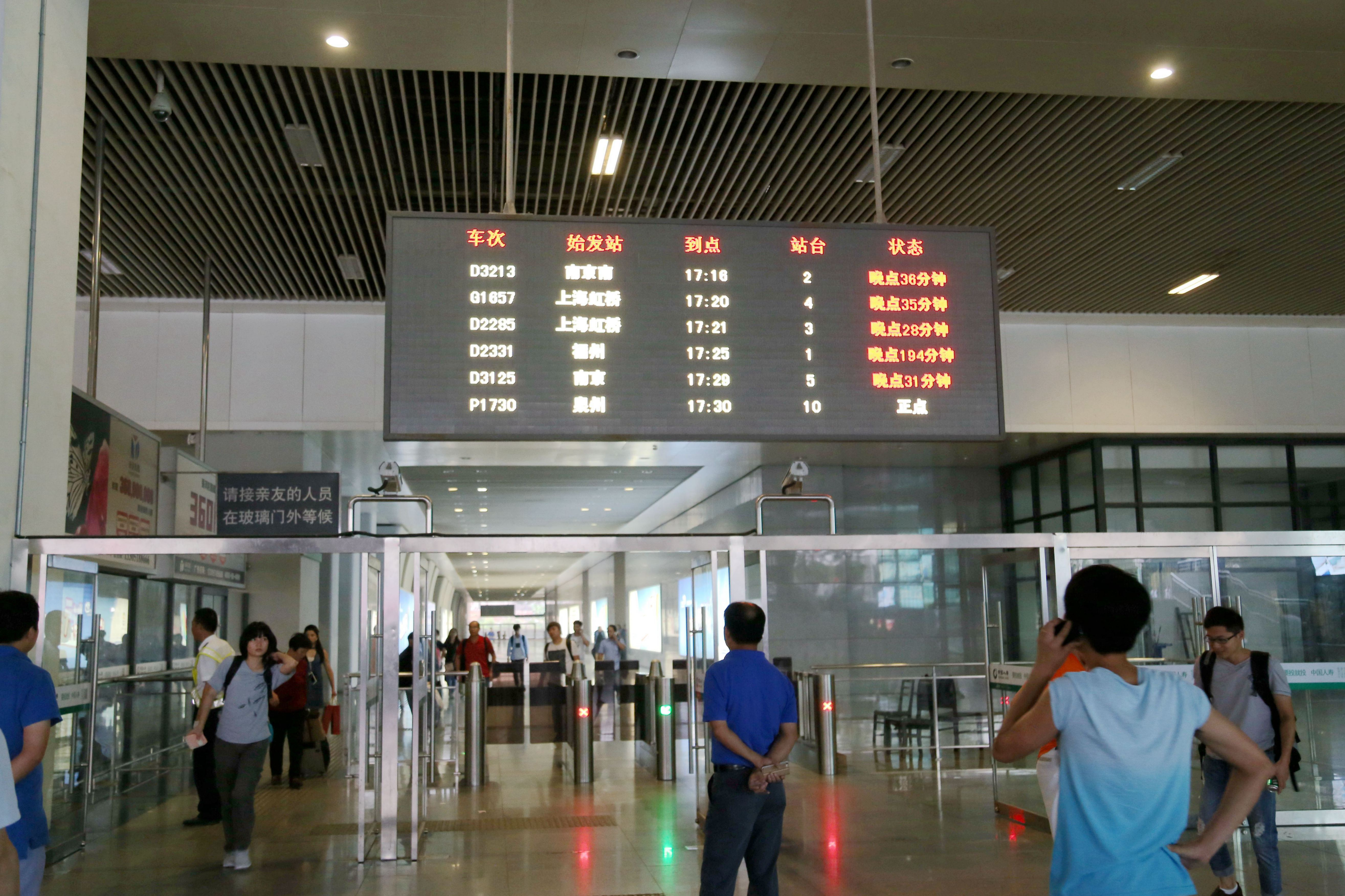 厦门北站出站口